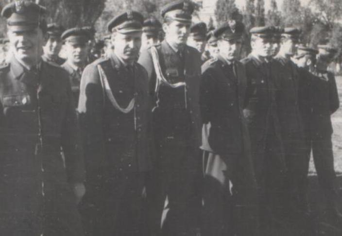 Garnizon Przasnysz. Kadra JW 4420 podczas uroczystej zbiórki